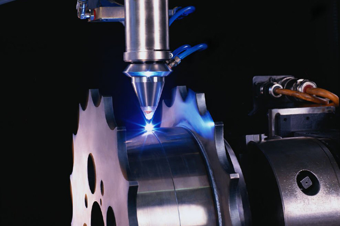 Laserschweißen von Dickblechen